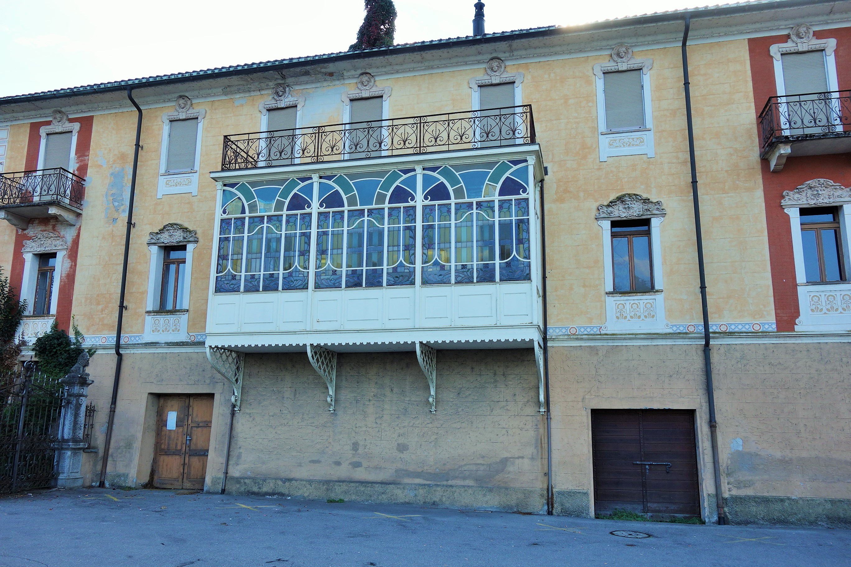 Magadino TI, Schweiz